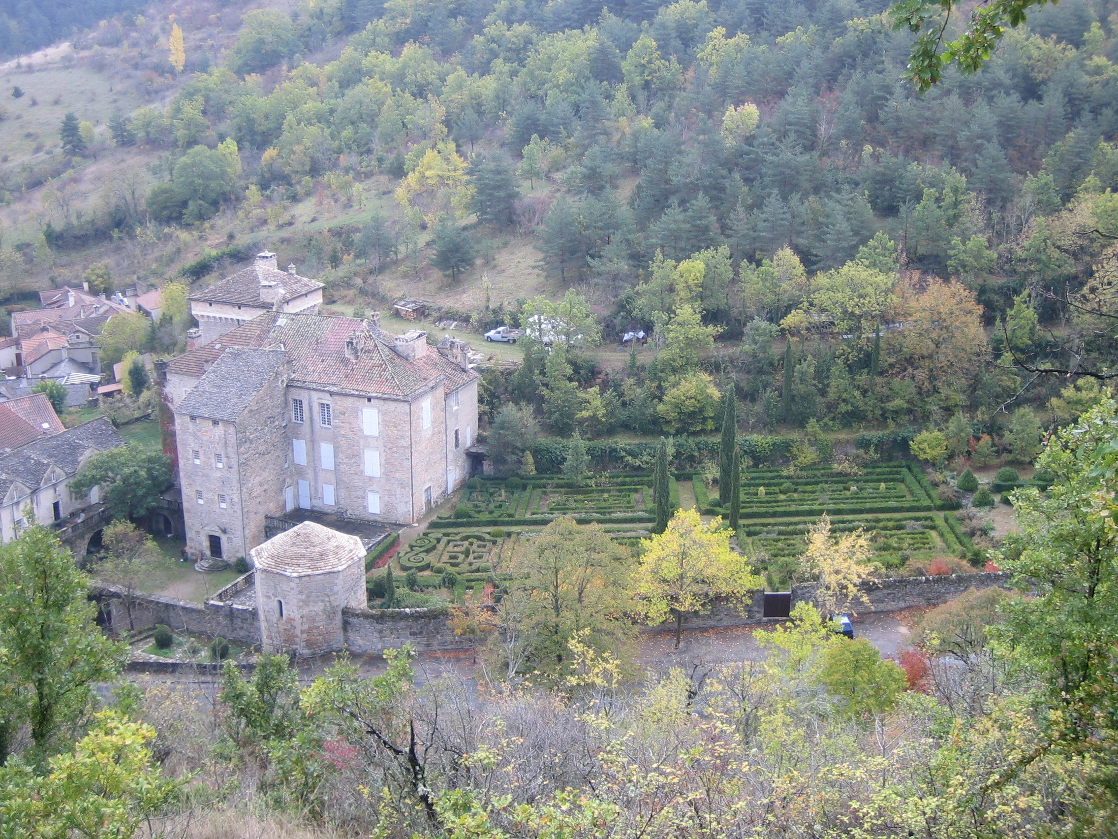 Peyreleau - le château de Triadou et son jardin